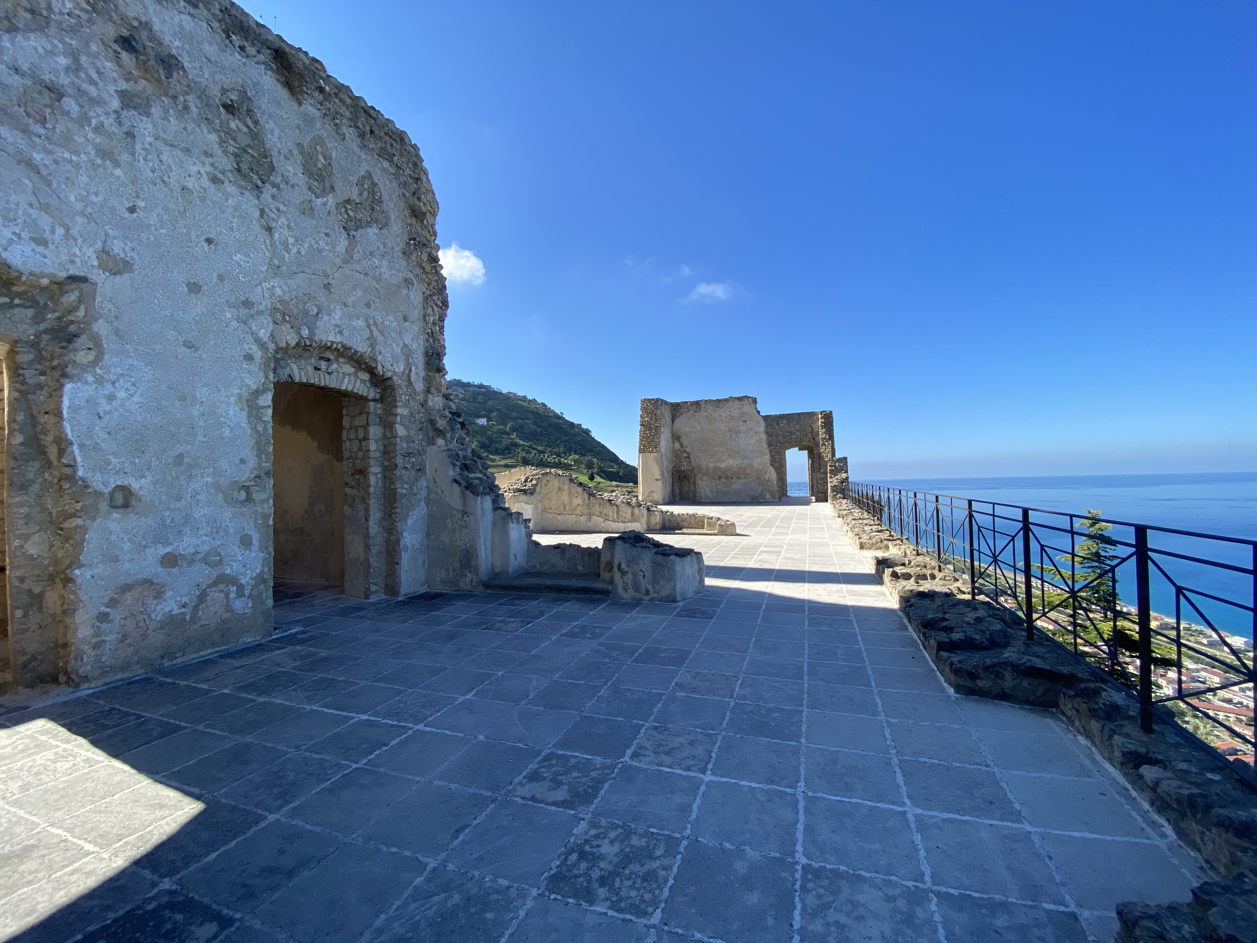 Castello di Fiumefreddo Bruzio